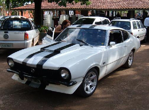 Brazilian Ford Maverick, ca. 1976.